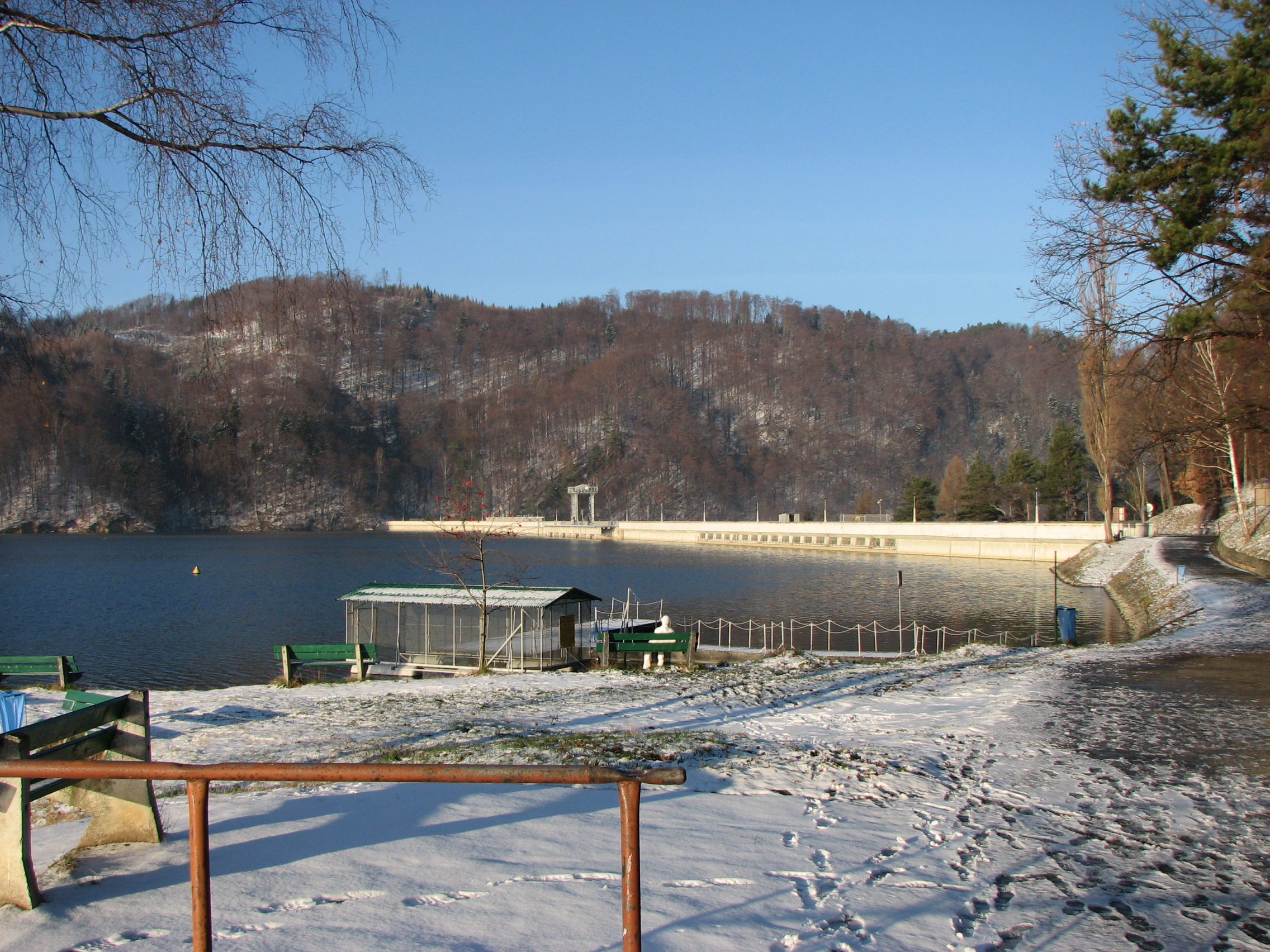 Zapora wodna w Roznowie